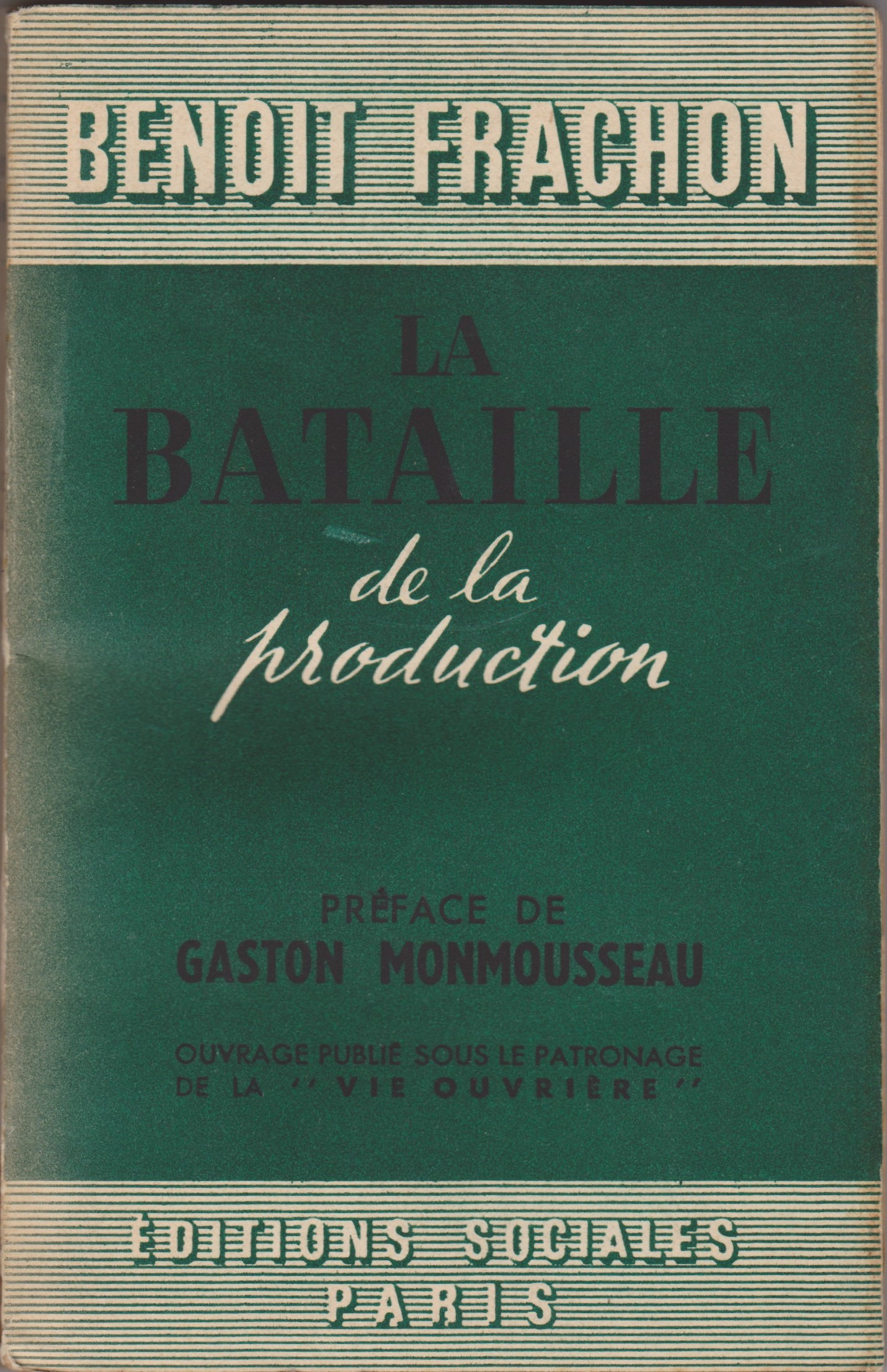 Livre publié aux éditions sociales à Paris, Reprise d'articles et de discours du secrétaire général de la CGT sur ce thème. Le préfacier, Gaston Monmousseau est aussi membre du bureau confédéral de la CGT et directeur de l'hebdomadaire syndical La Vie ouvrière